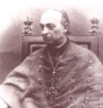 A photo portrait